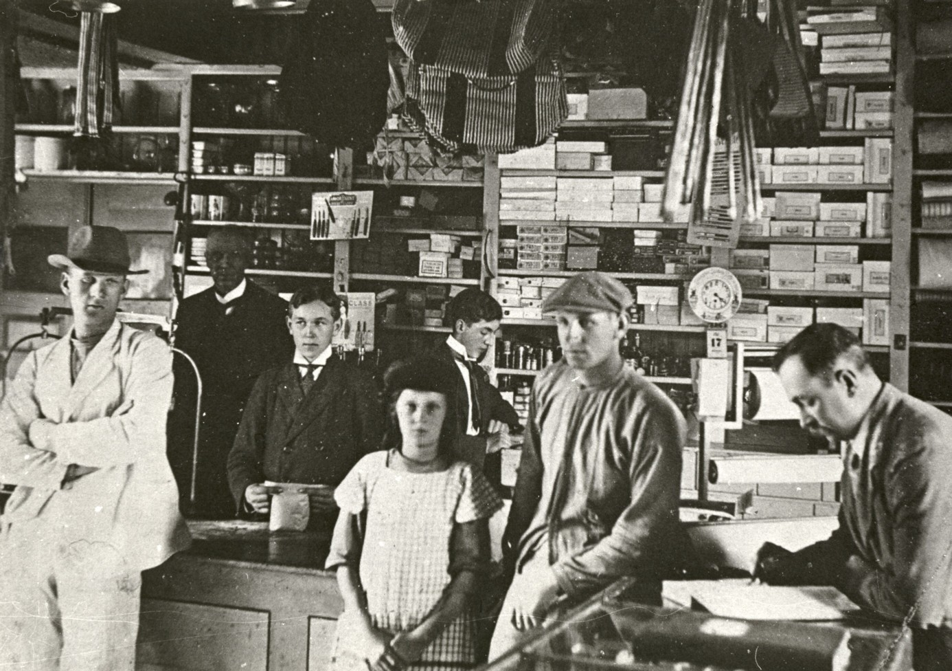 Lanthandel i Glava i Värmland, Sverige omkring 1912